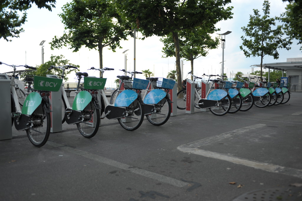 station VLS